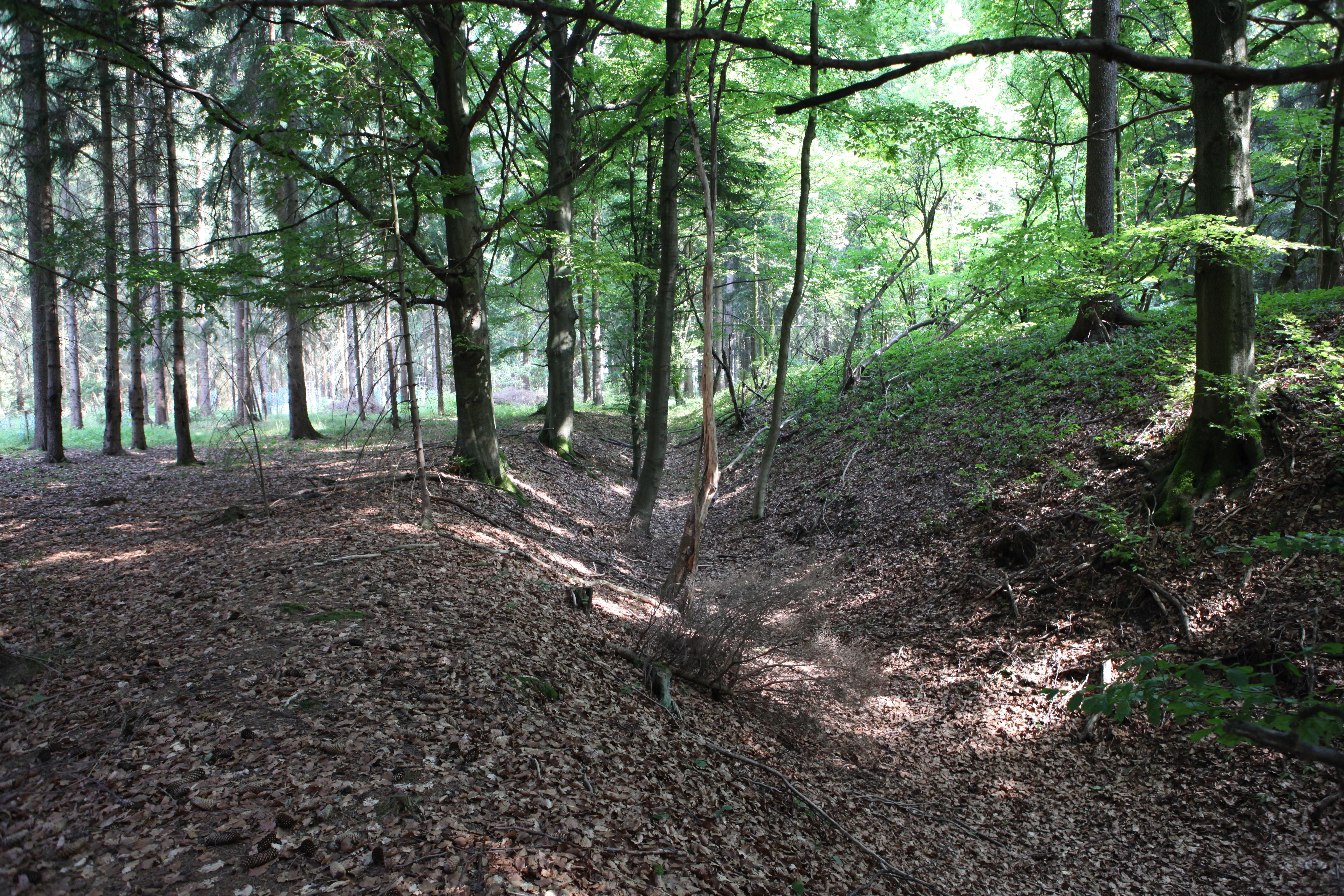 Gruber Burg bei Bachfeld